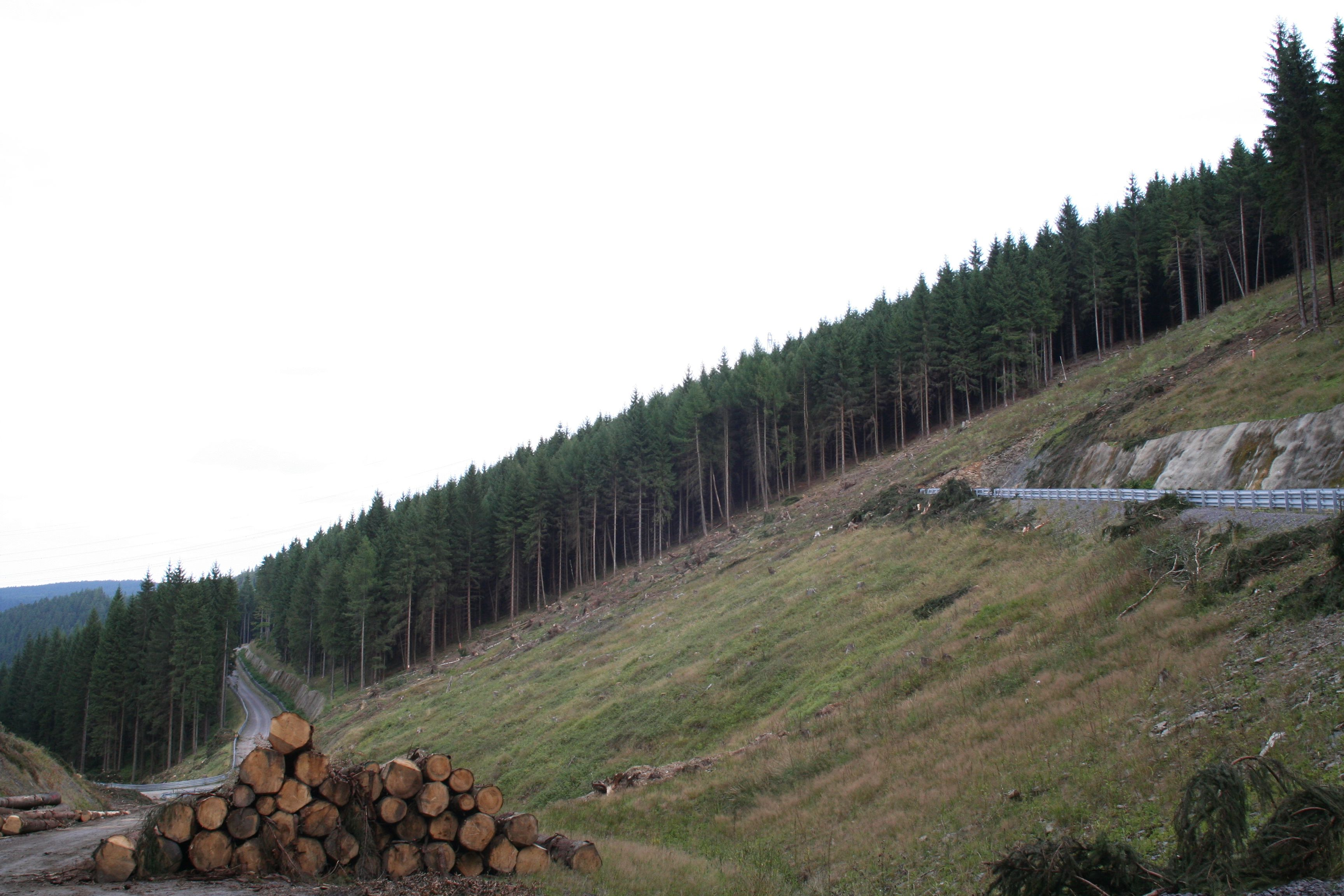 Tunnelportal Nord des Tunnel Goldberg bei Goldisthal, nach Abholzung des Hanges